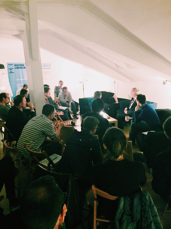 Spotkanie z prof. Stanisławem Gomułką w ramach seminarium "#YOLO. Przegrana przyszłość polskiej wolności?", które odbyło się na Poddaszu Kultury.